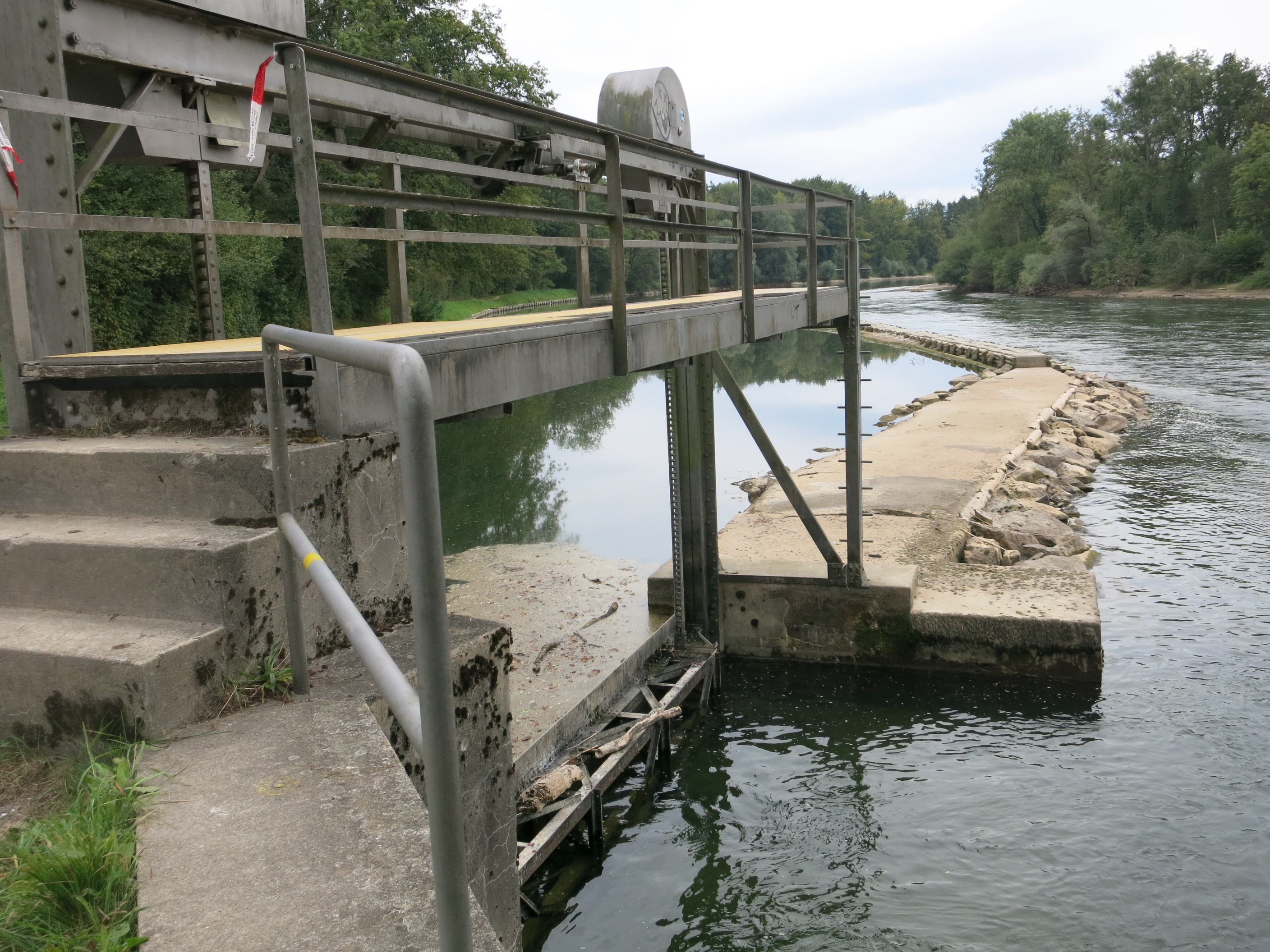 Historisches Kleinkraftwerk Ottenbach ZH, Schweiz